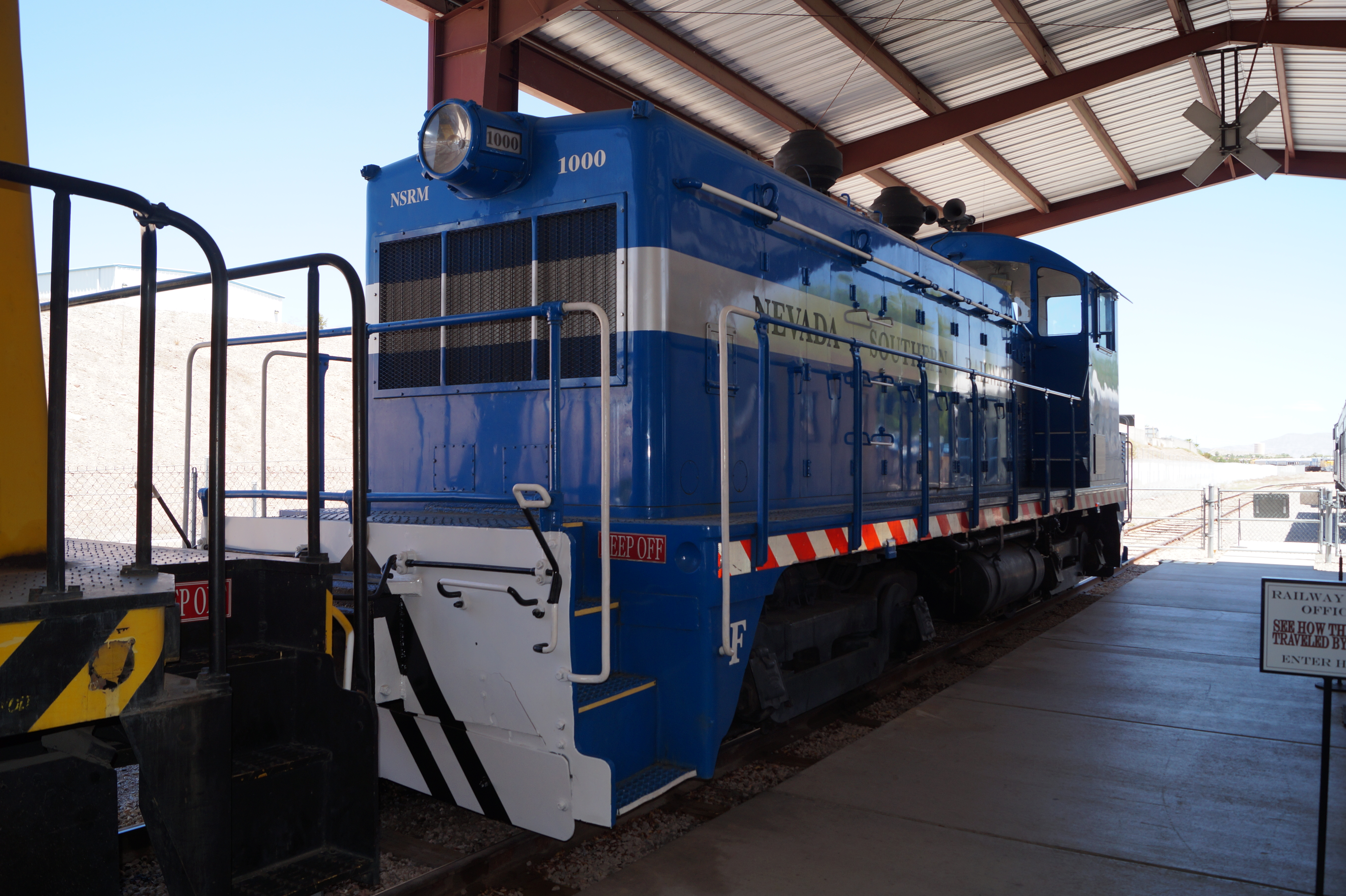 The Nevada State Railroad Museum which is an agency of the Nevada Department of Cultural Affairs. It is located at Yucca Street on the tracks of the historic Union Pacific Railroad branch Henderson-Boulder City near the former Boulder City Railroad Yards where the Hoover Dam construction equipment was unloaded in the 1930s.